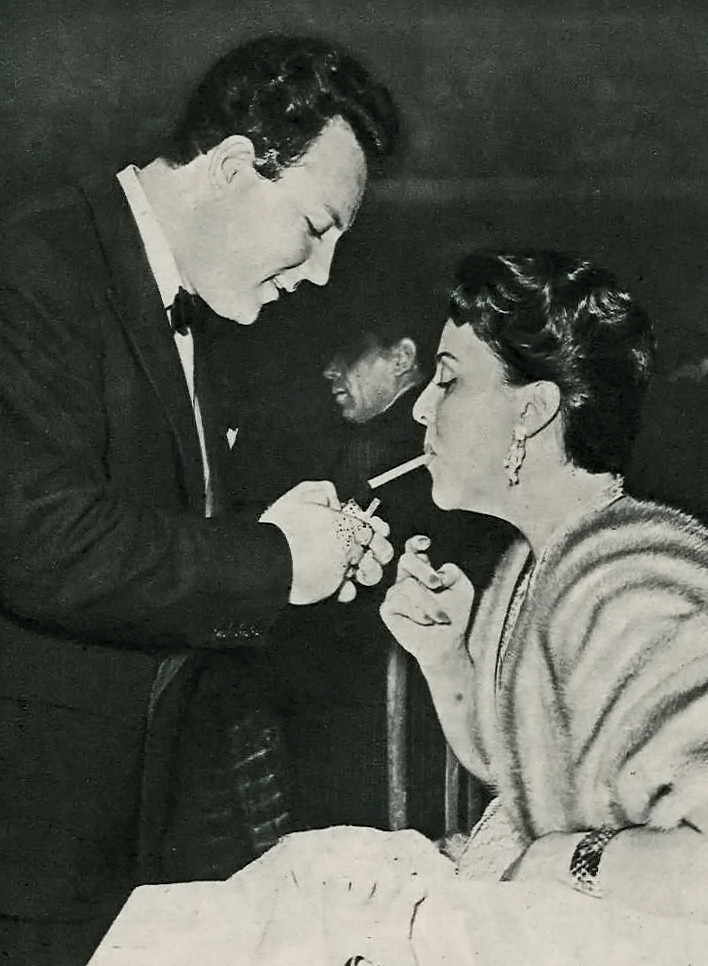 Claudio Villa con Jula De Palma al Festival di Sanremo 1955